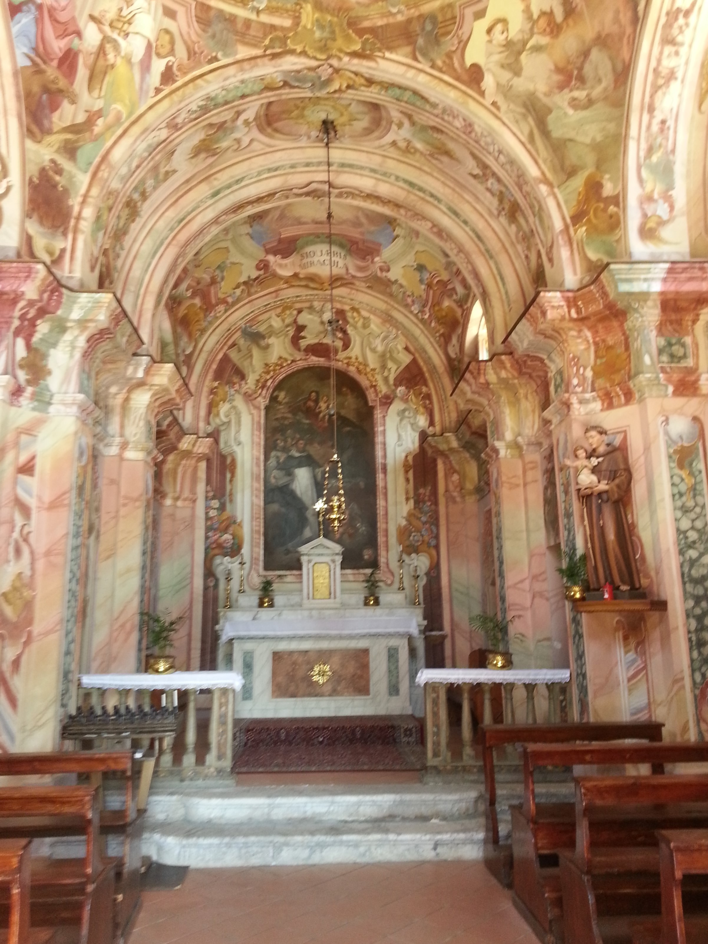 Presbiterio con affreschi della chiesa di sant'Antonio di Ardeiso.